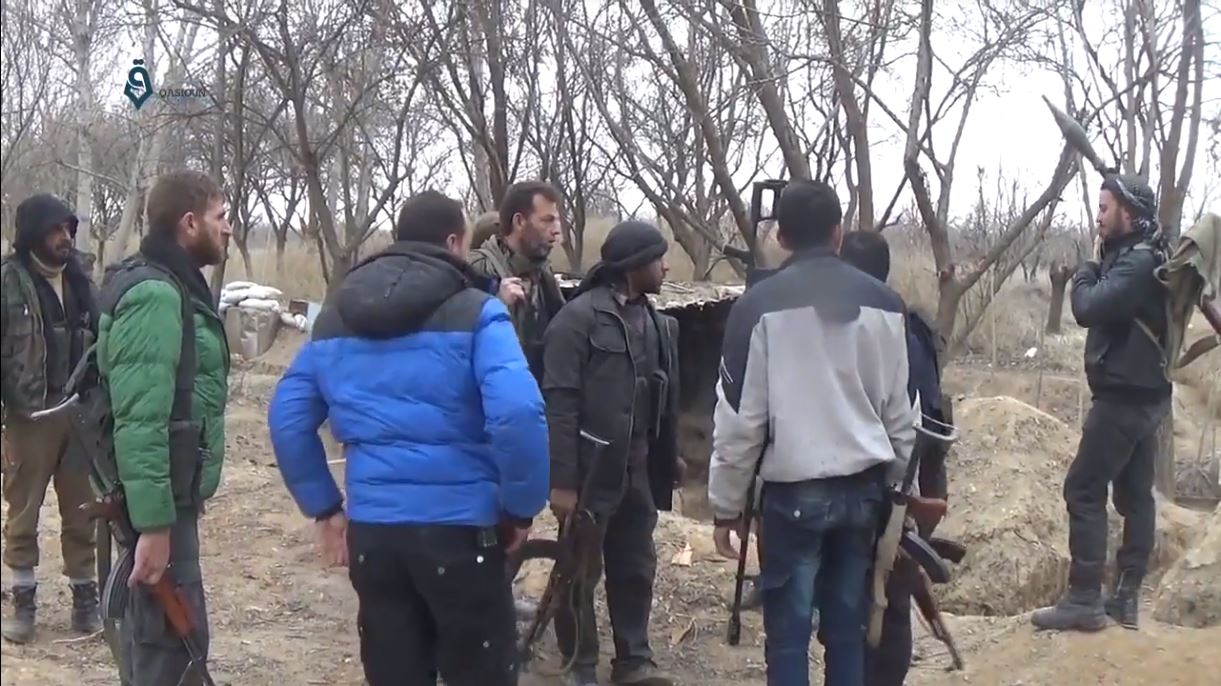 Rebelles de Jaych al-Islam à al-Marj, dans la Ghouta orientale, lors de la guerre civile syrienne, le 13 février 2017.